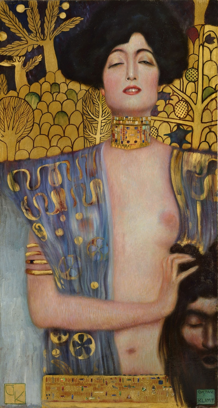 Tableau représentant Judith tenant dans ses mains la tête d'Holopherne.